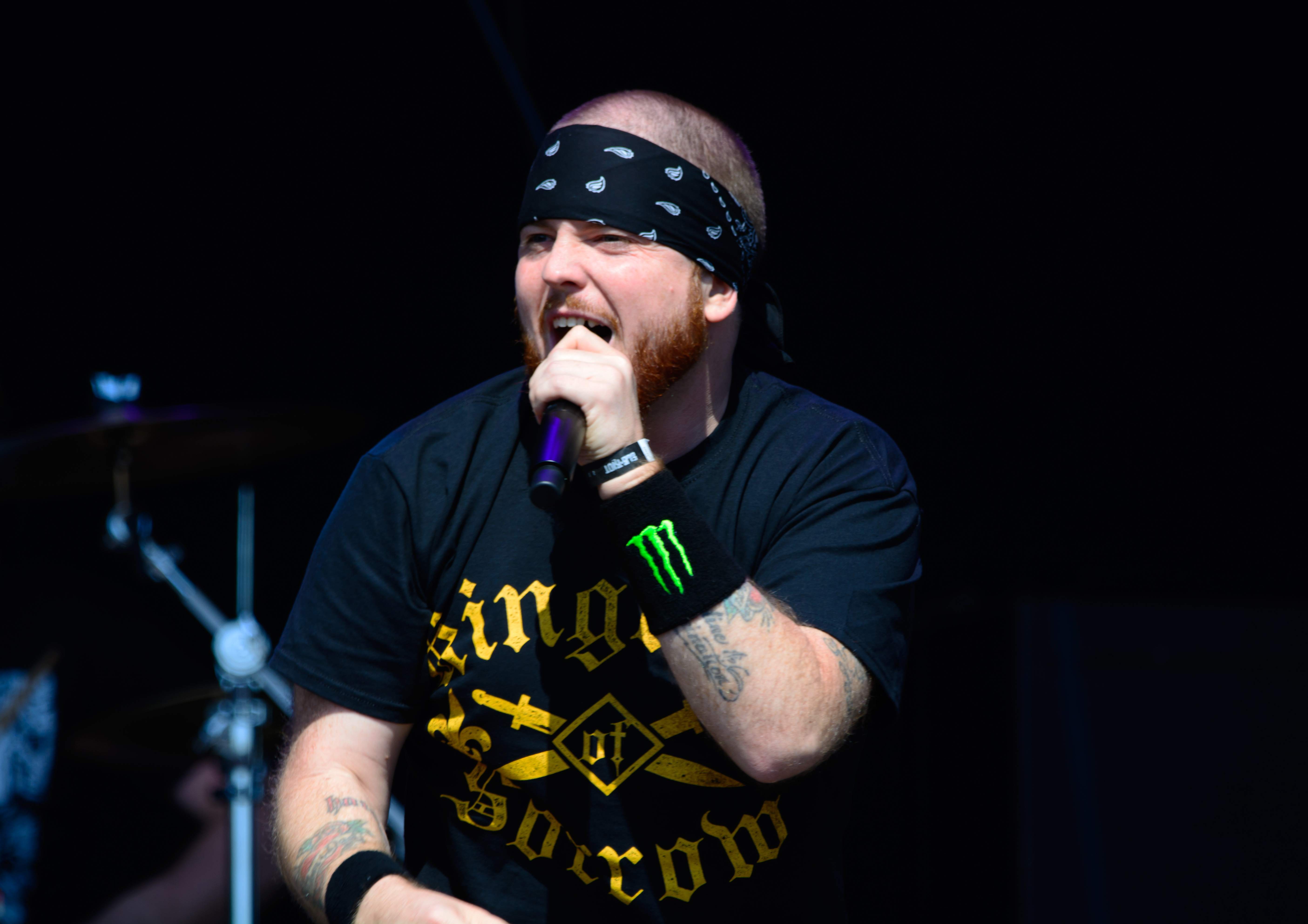 Jasta beim Elbriot 2018